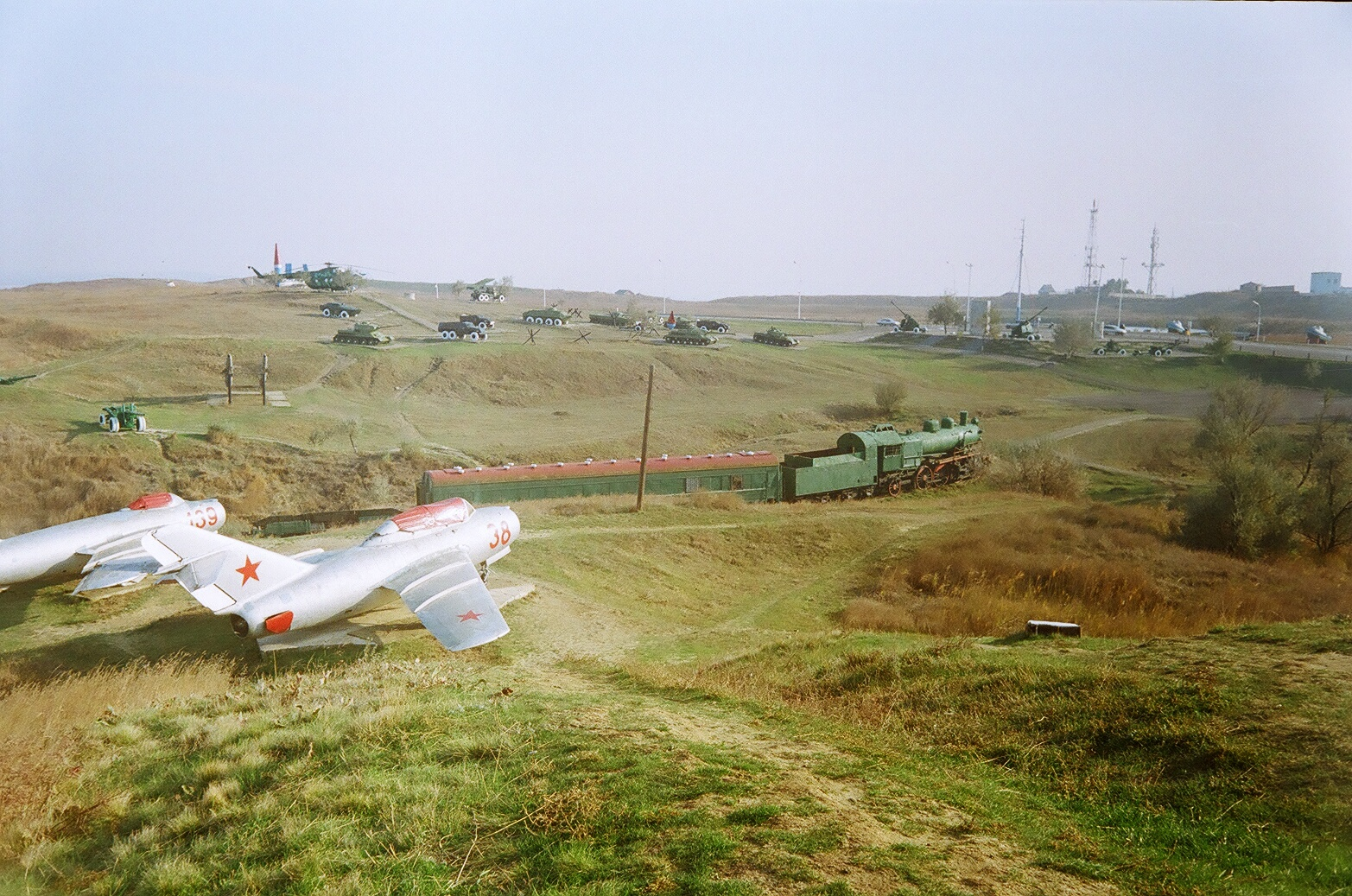 Темрюк. Экспонаты времён Великой Отечественной войны музея "Военная горка"